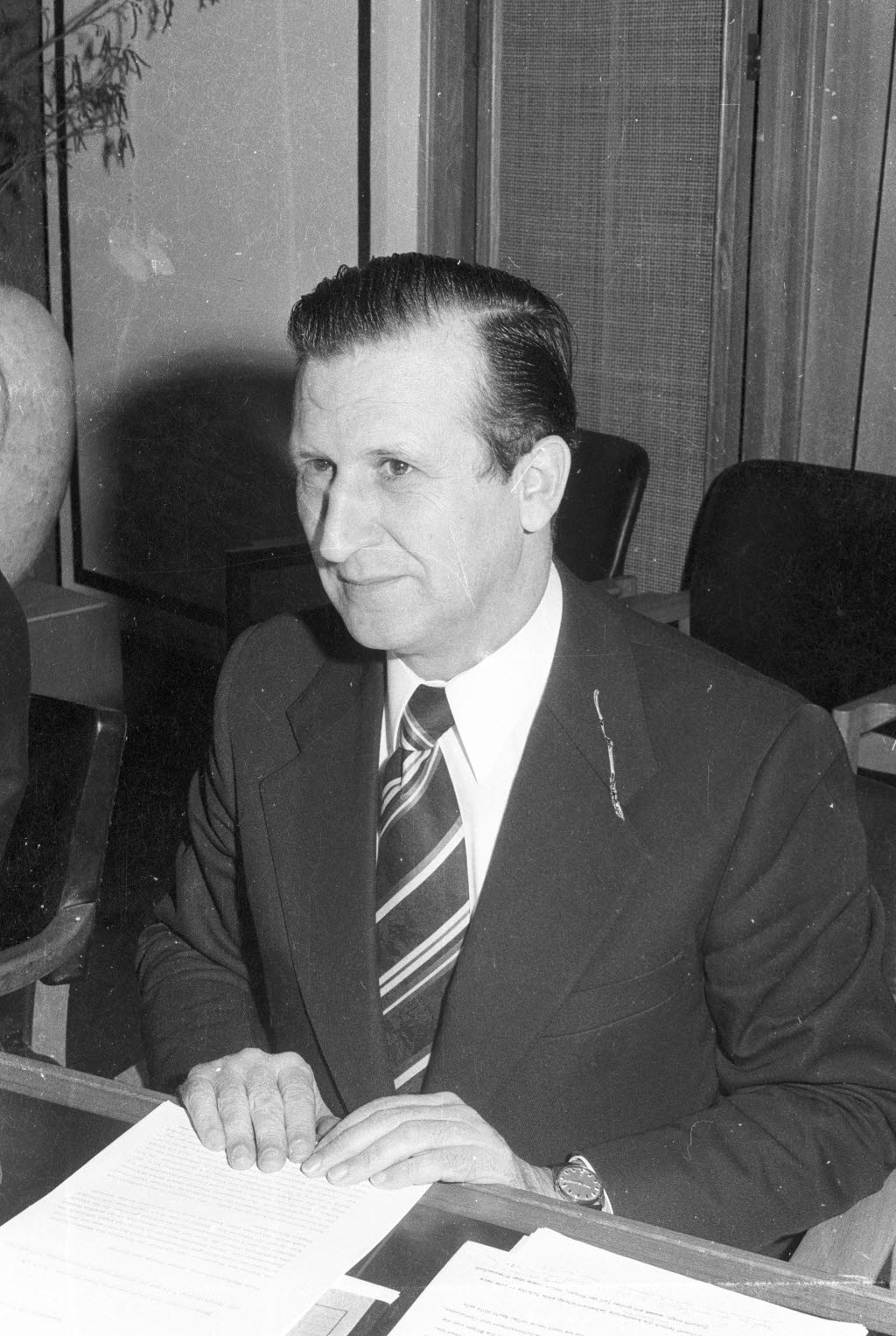 in der Ratsversammlung.